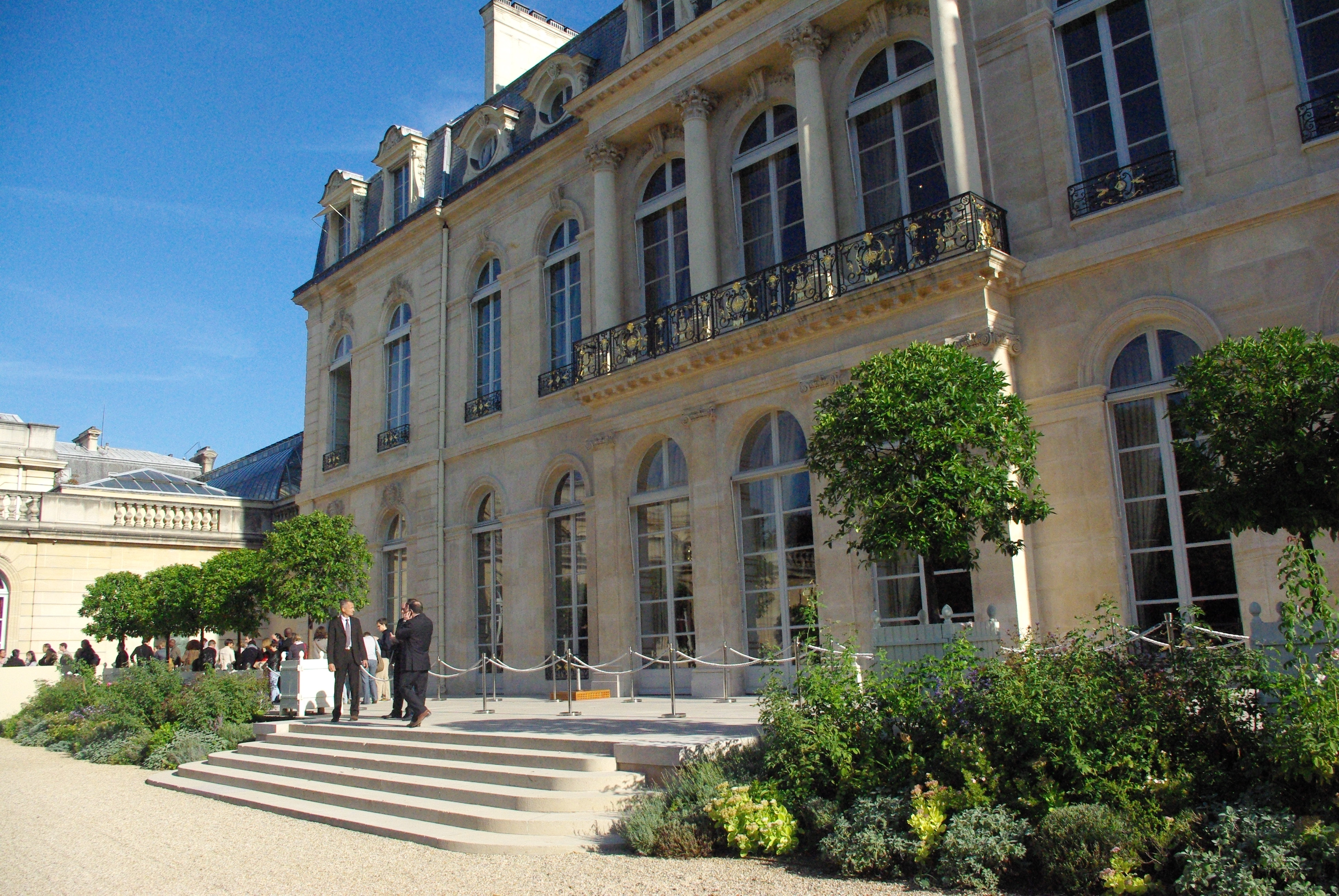 Façade du palais de l'Élysée côté jardin